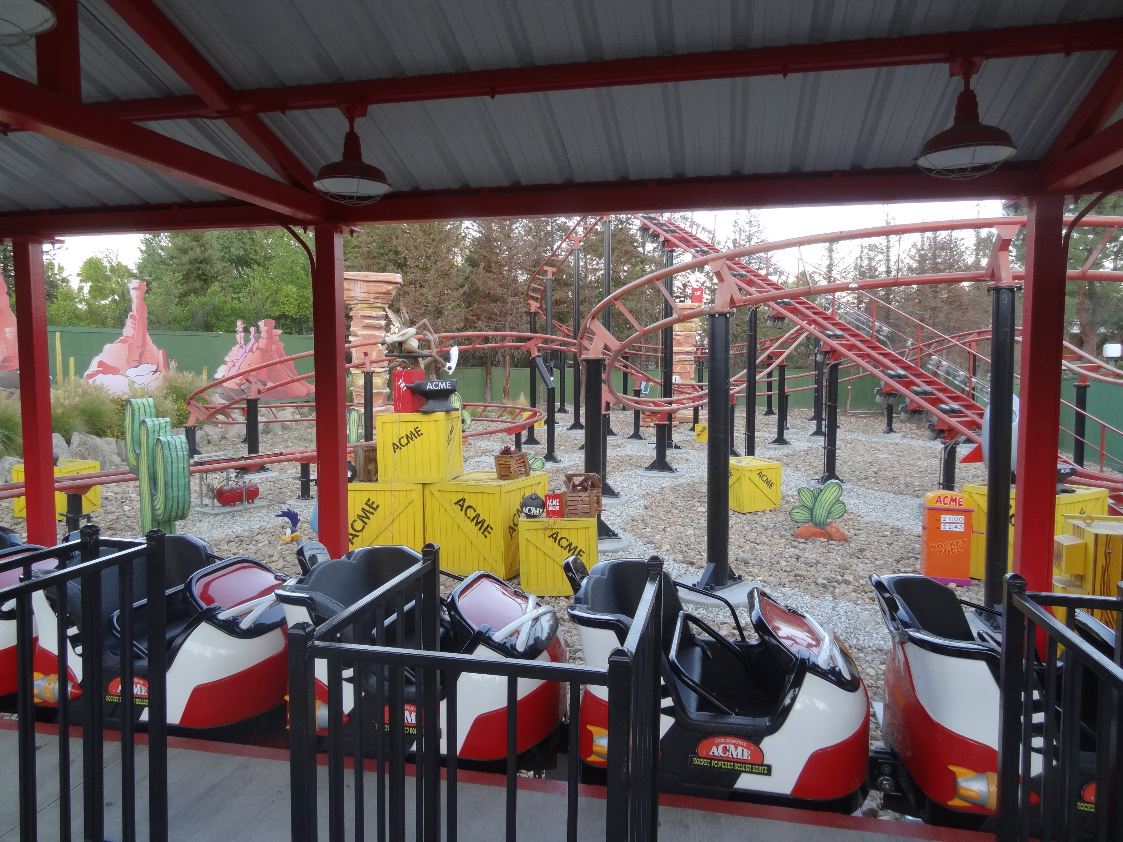 Road Runner Express à Six Flags Magic Mountain.